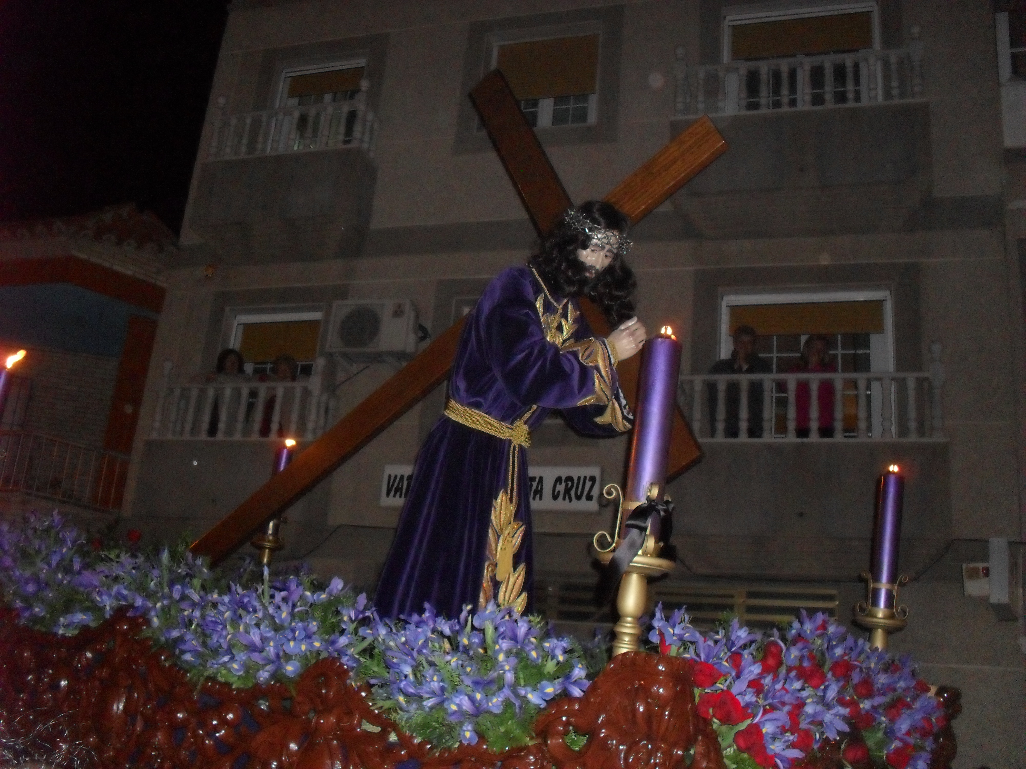 Ntro. Padre Jesús Nazareno durante la reverencia frente a la Santa Cruz (Roquetas de Mar)